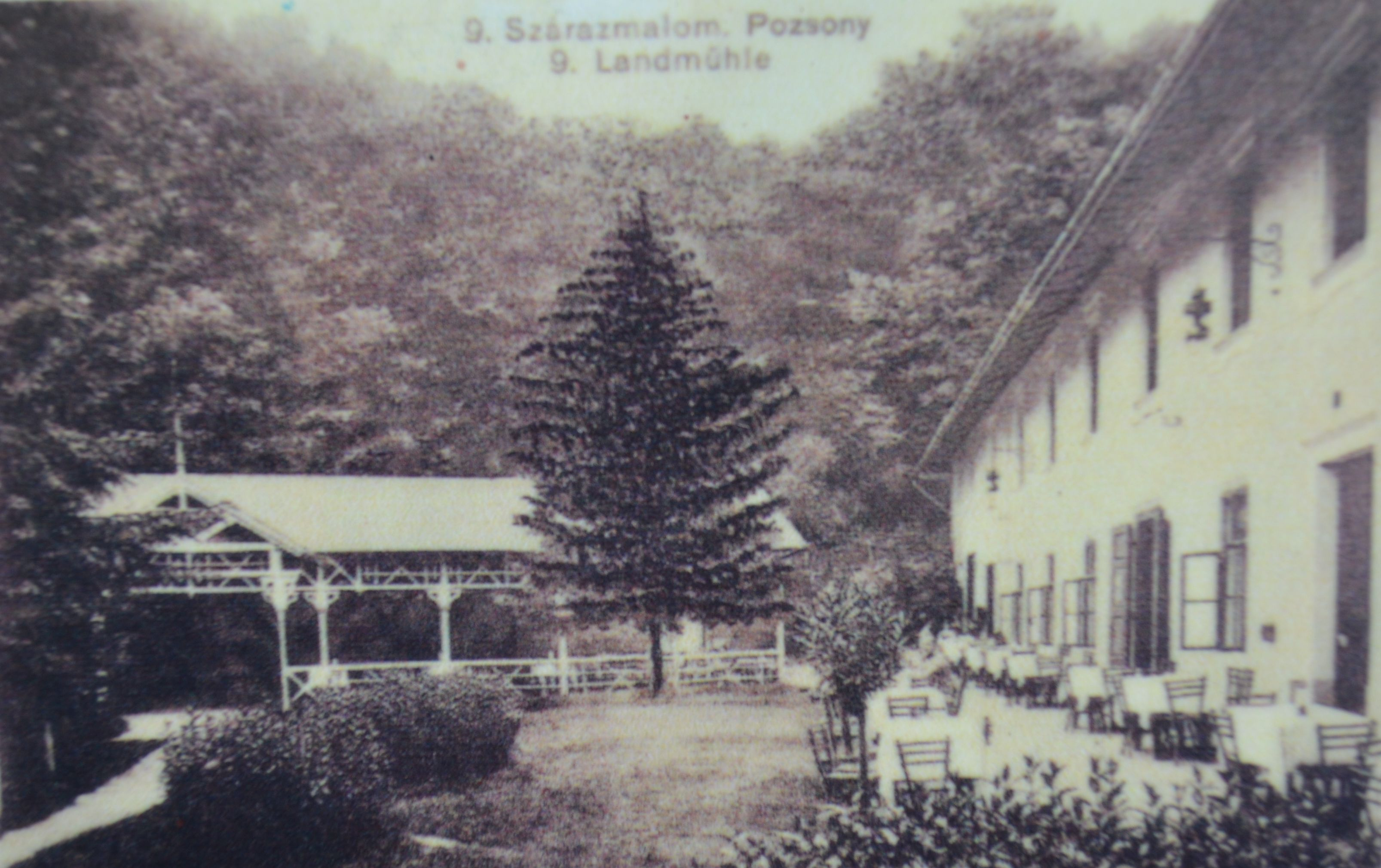 Historické foto z roku 1904 zachytáva nádvorie IX. mlyna s letnou reštauráciou